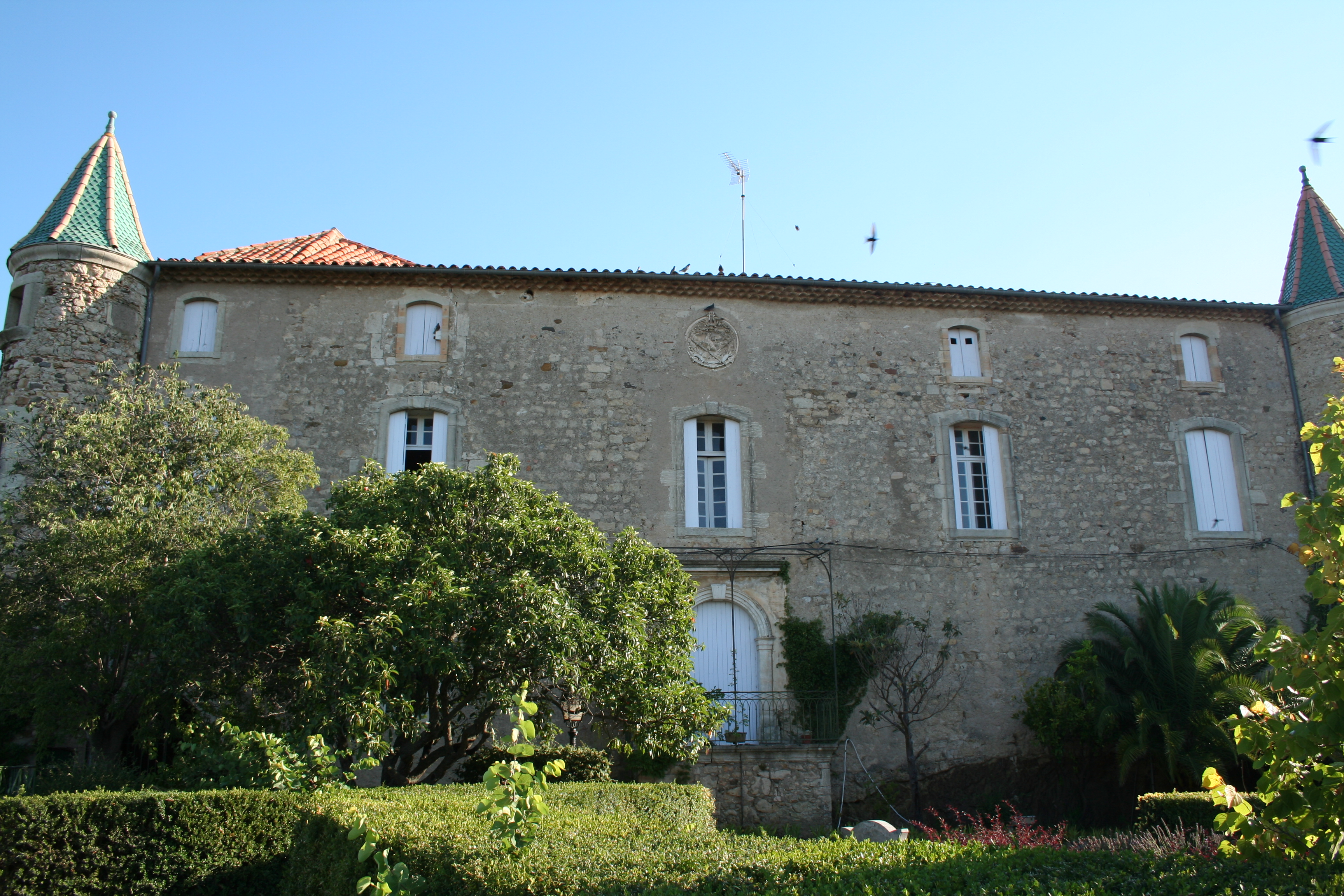 Laurens (Hérault) - mairie - ancien château.